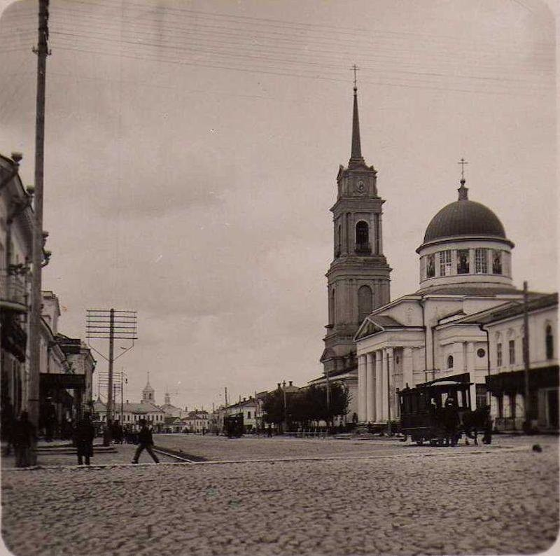 Свято-Преображенский собор Тулы